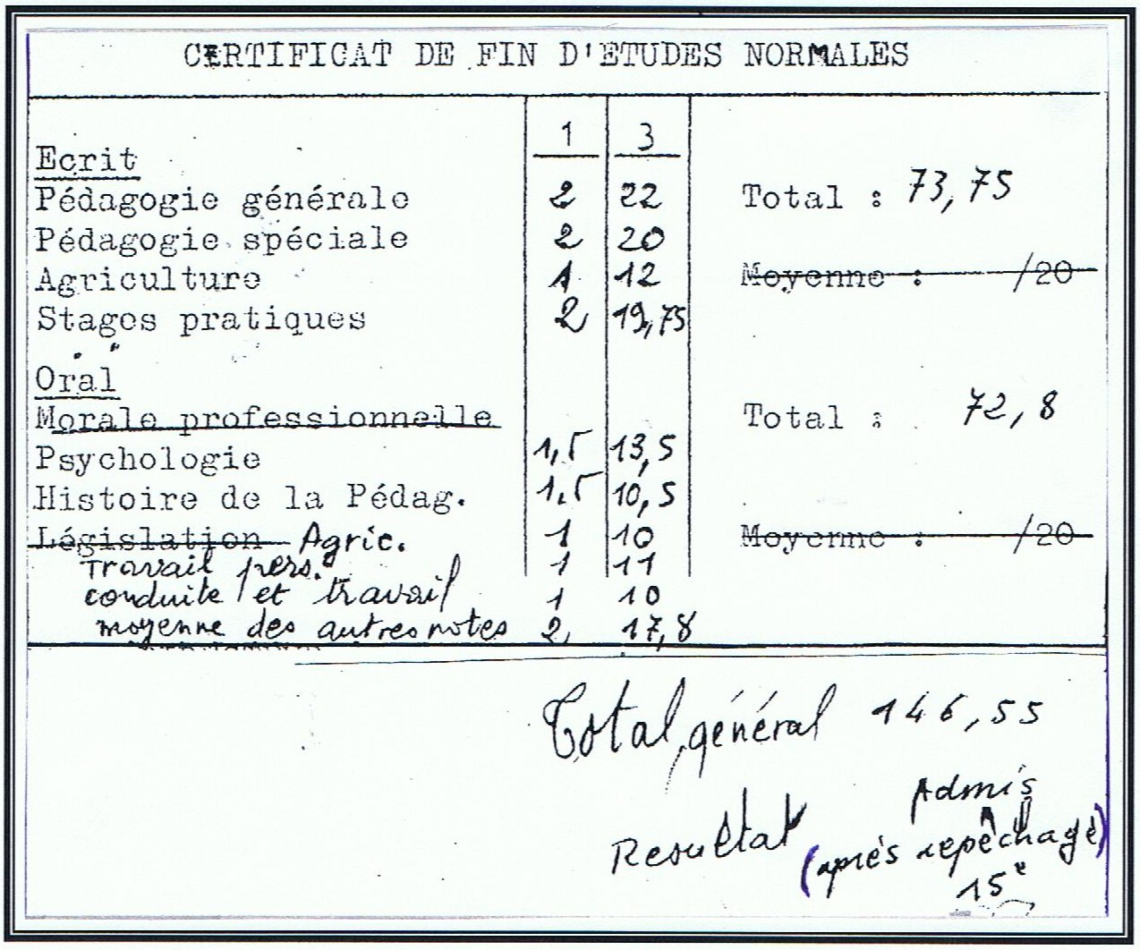 Fac similé d'un des CFEN délivrés en juin 1962 à un des Elèves-maîtres stagiaires de 4e année par l'Ecole normale de garçons d'Avignon (Vaucluse). CFEN auquel il fallait être admis pour prétendre être nommé sur un poste comme instituteur stagiaire. A la fin du 1er trimestre, après une inspection dans sa classe, l'instituteur stagiaire devait être admis au «certificat d'aptitude pédagogique» (CAP) pour être enfin nommé instituteur titulaire de son poste et donc fonctionnaire de catégorie B de la Fonction publique